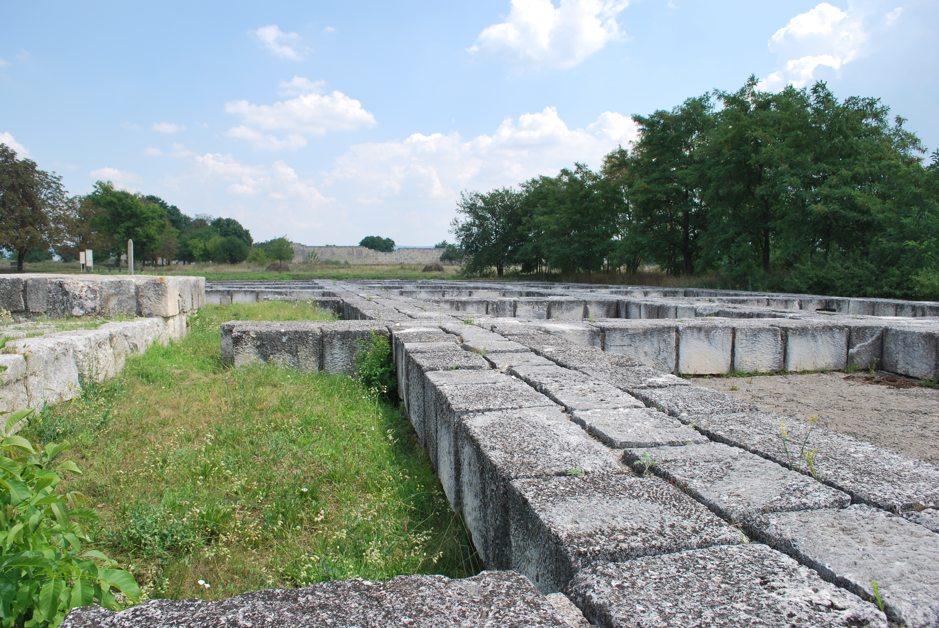 Плиска - Стената до главния вход